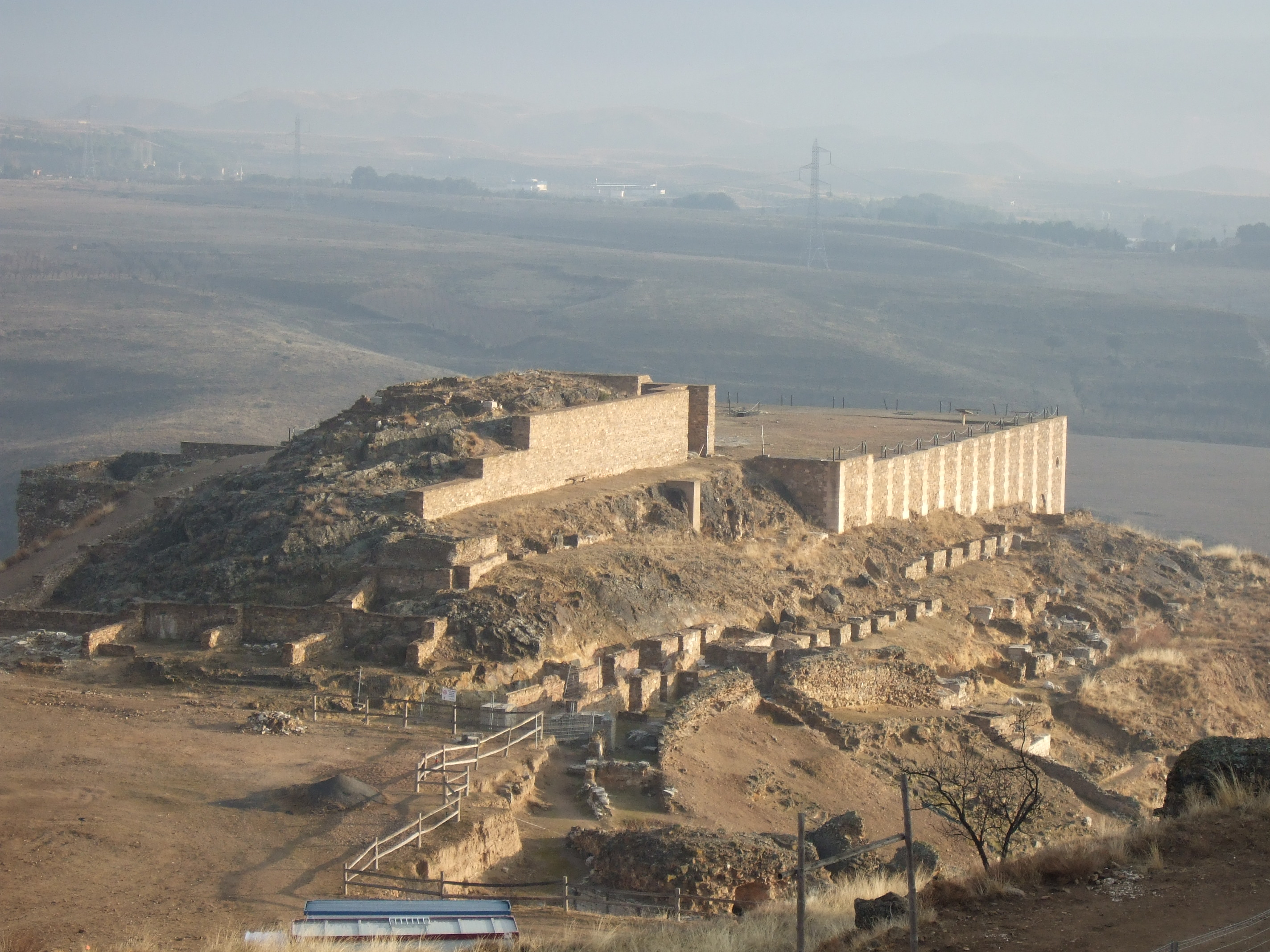 Foro de Bílbilis con la base del templo delante